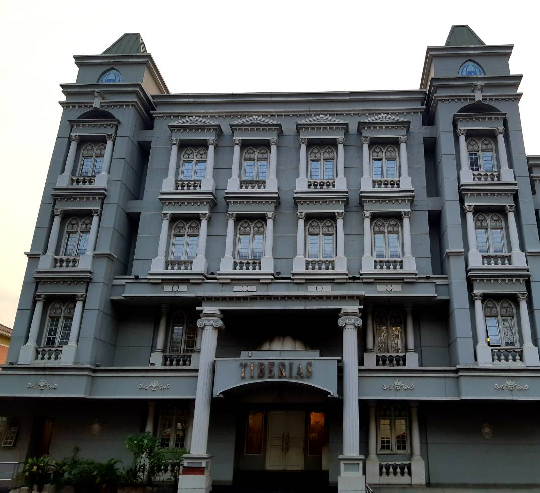 Tampak luar Gereja Tiberias Indonesia di Jalan Boulevard Utara, Kelapa Gading, Jakarta